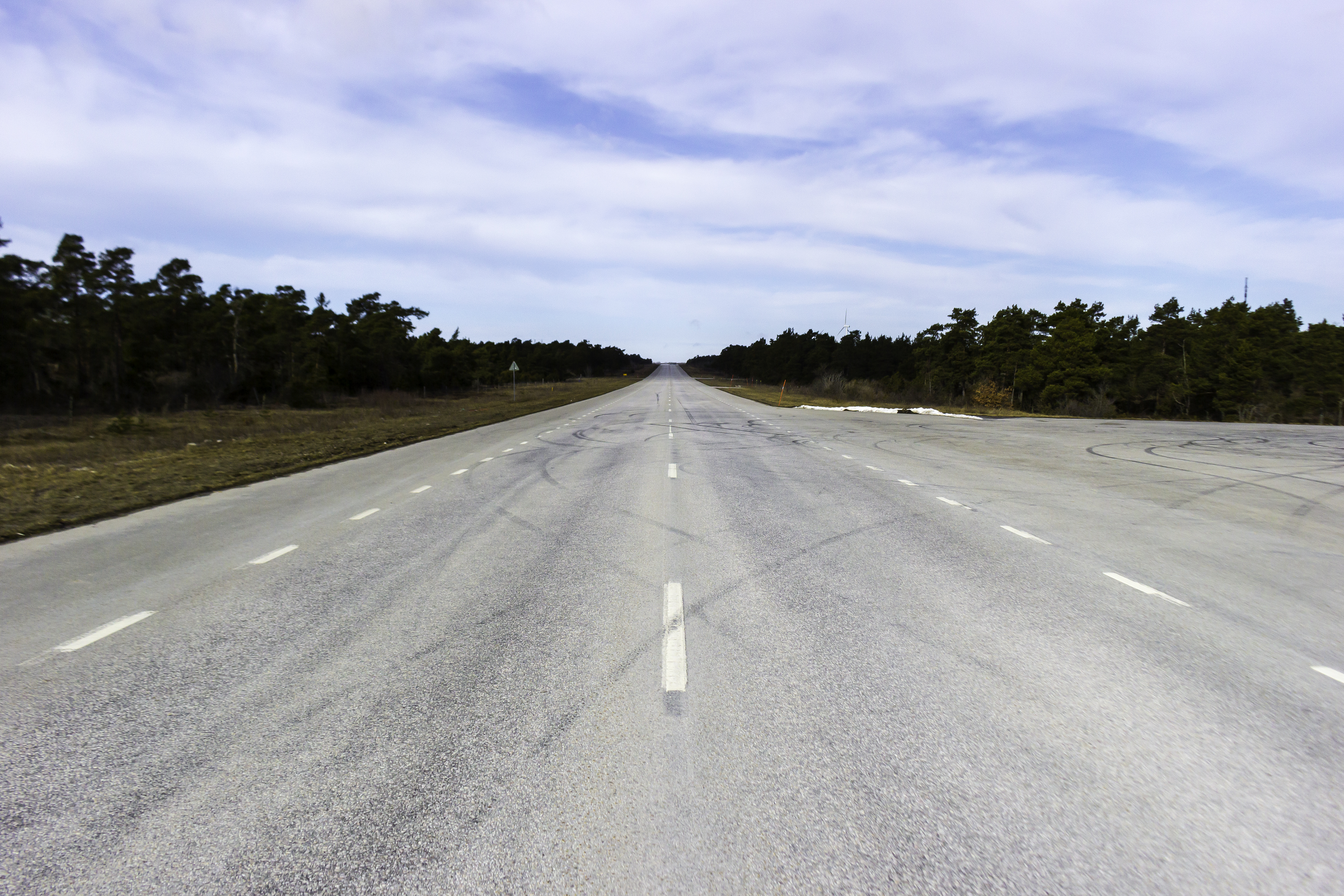 Pista de aterraxe nunha estrada en Bro, Gotland.